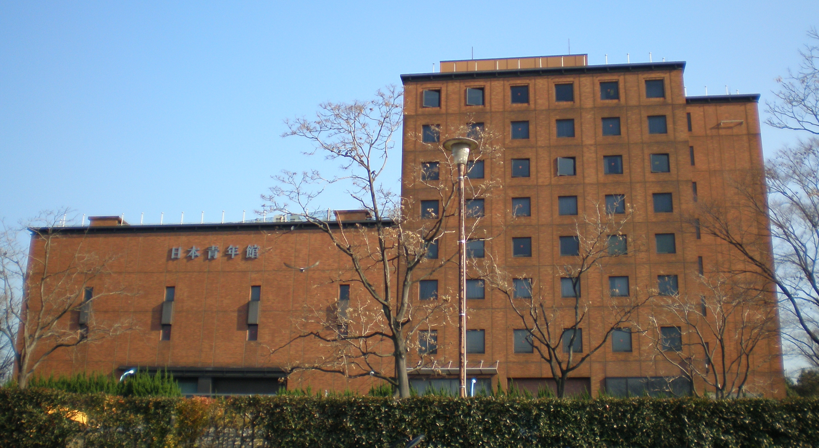 Nihon Seinenkan in Shinjuku, Tokyo.